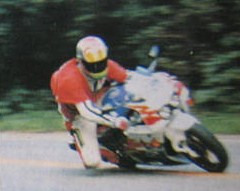 田島峠のNC29('92)